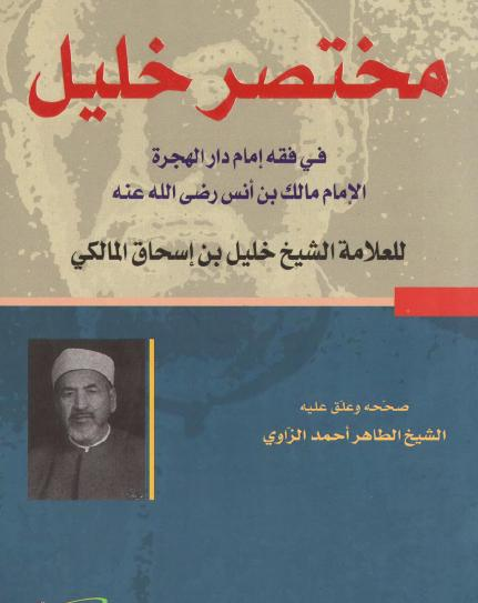 غلاف طبعة من مختصر خليل